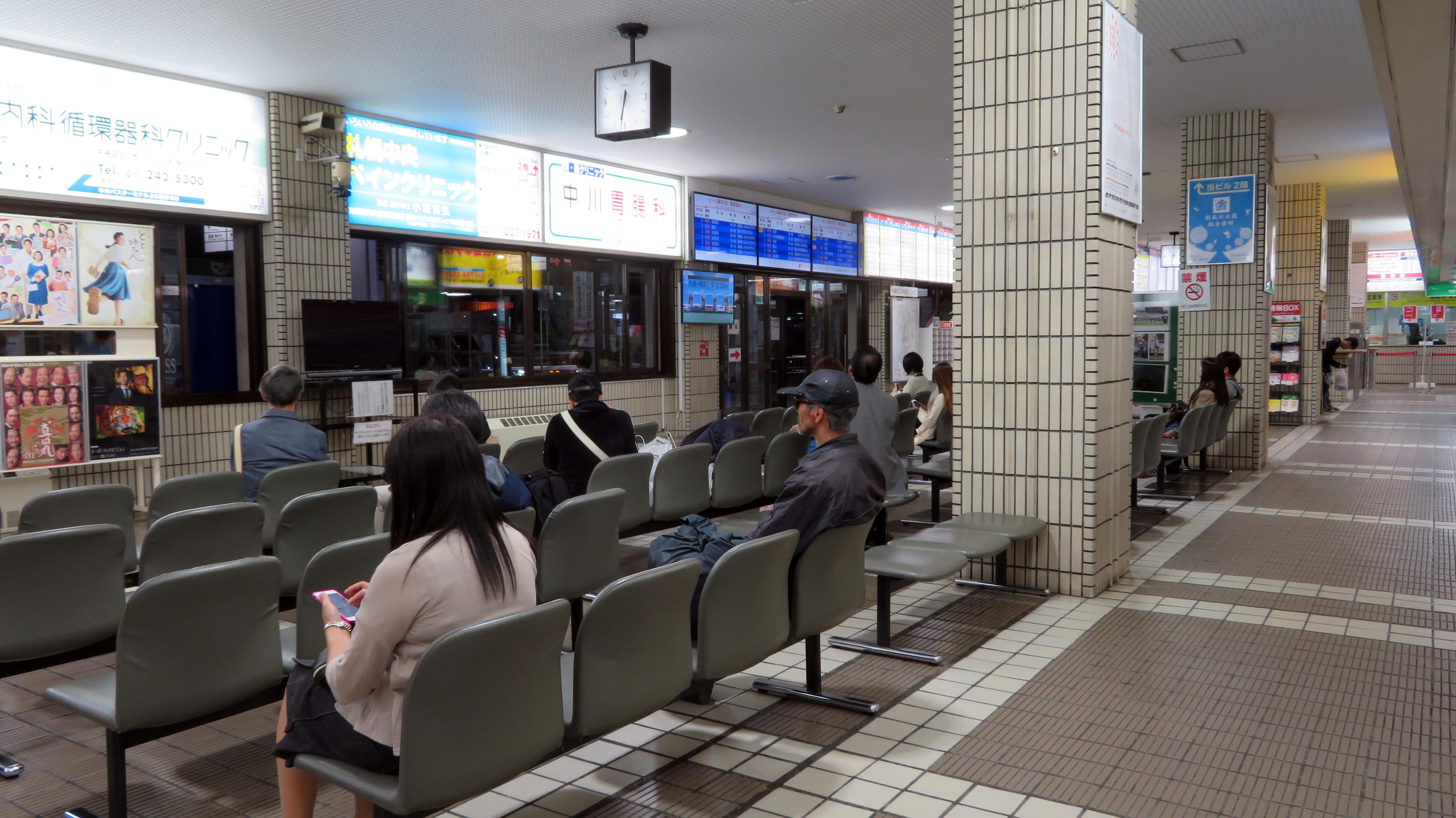 札幌ターミナル待合室 Canon PowerShot SX720 HS